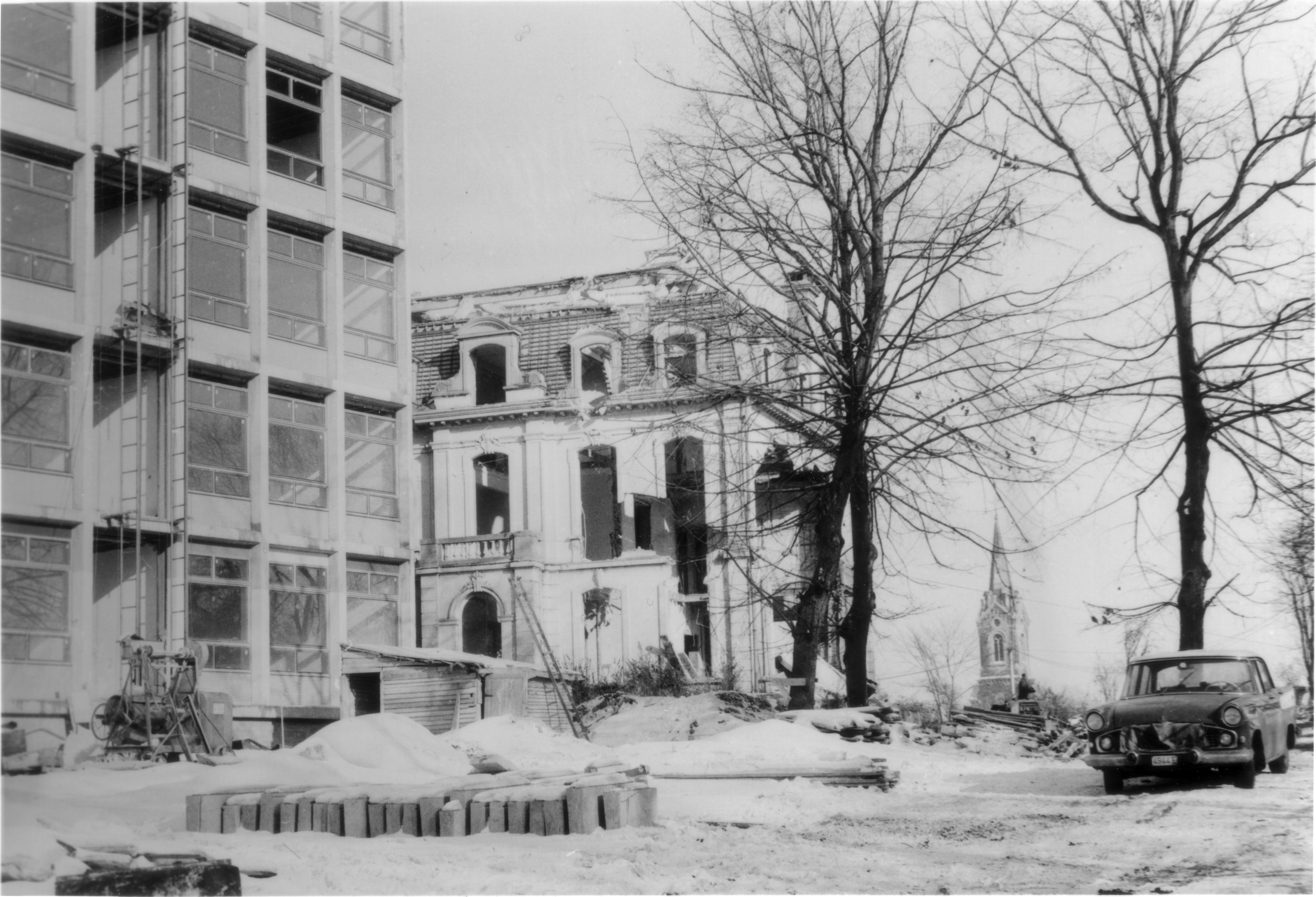 IPES Verviers en construction et Château Peltzer de Clermont à Verviers, façade sud, église Saint-Antoine.